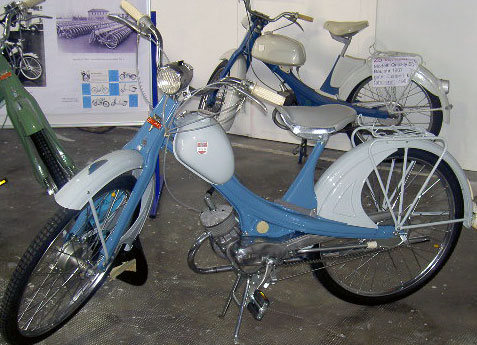 Quickly S, restauriert Farbe lidoblau / perlgrau